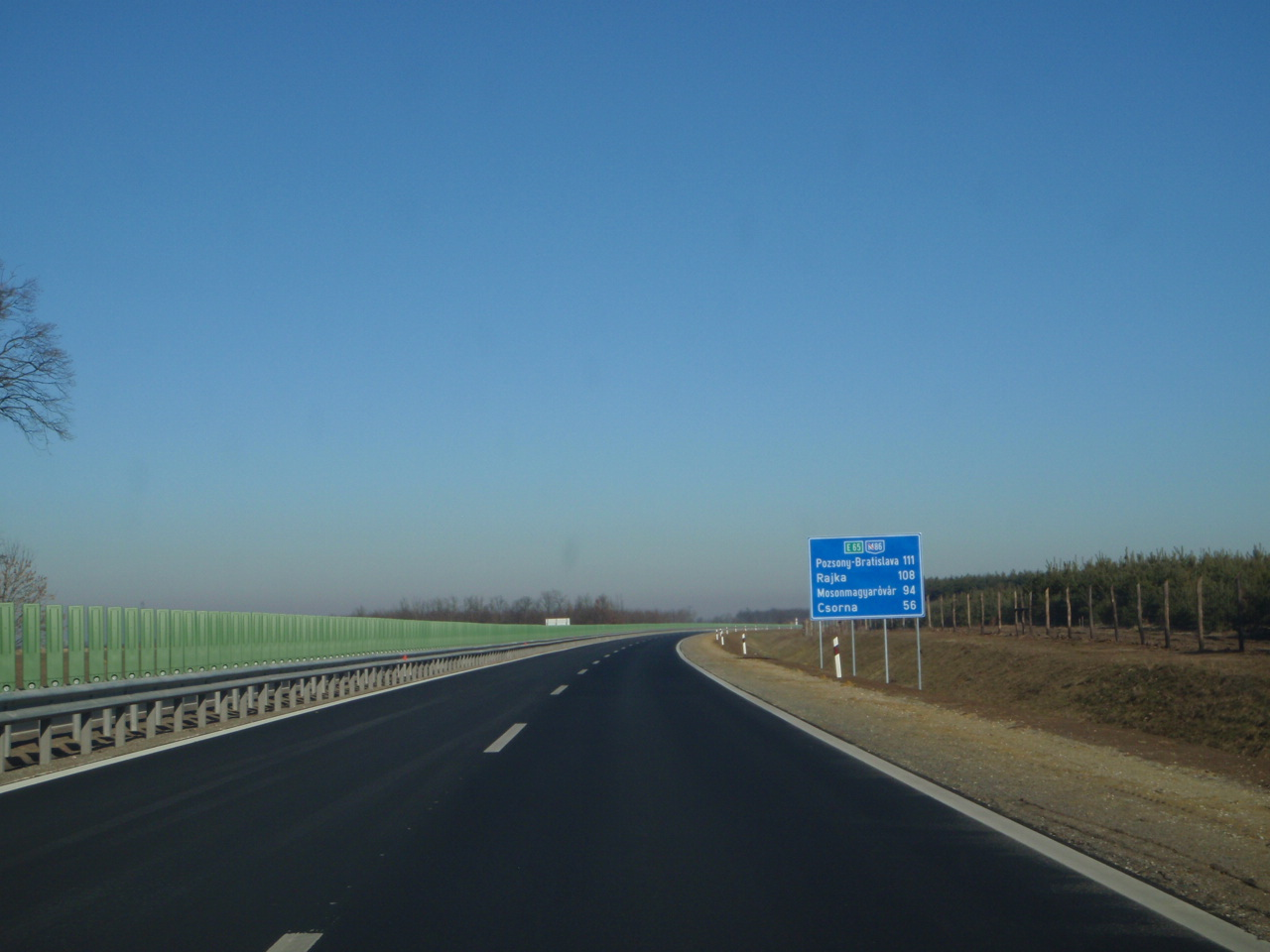 Steinamangererschnellstrasse bei Szeleste